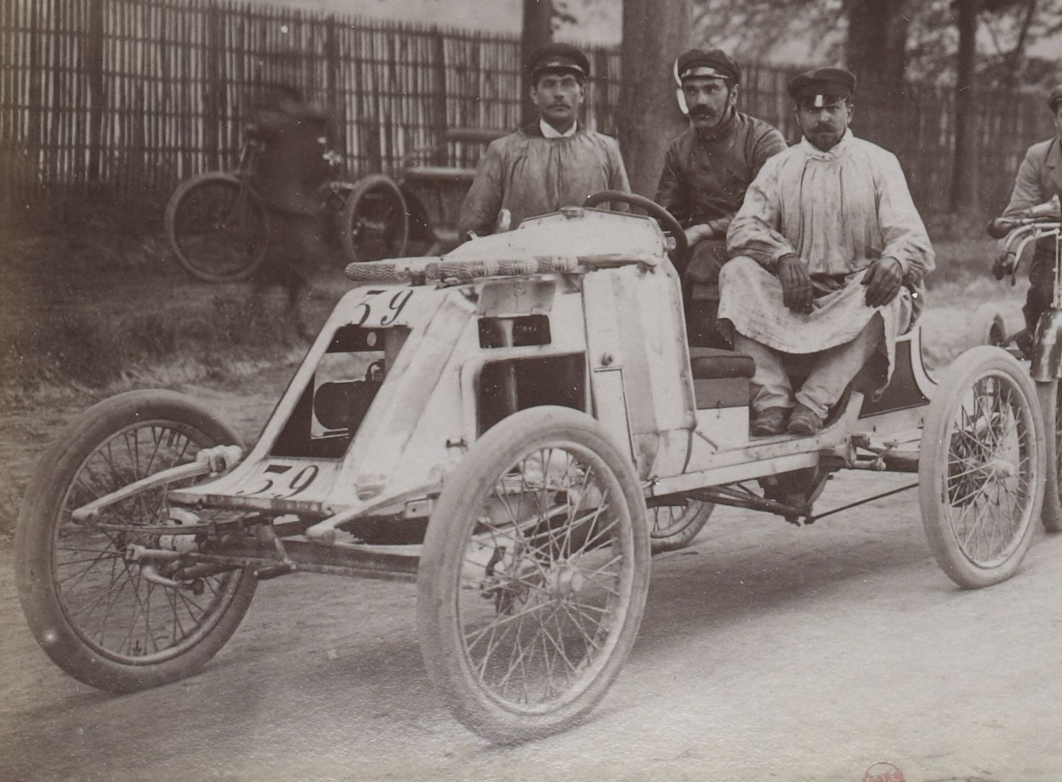 [Collection Jules Beau. Photographie sportive] : T. 15. Année 1901 / Jules Beau : F. 39. [Coupe Gordon-Bennet et Paris - Bordeaux, 29 mai 1901]